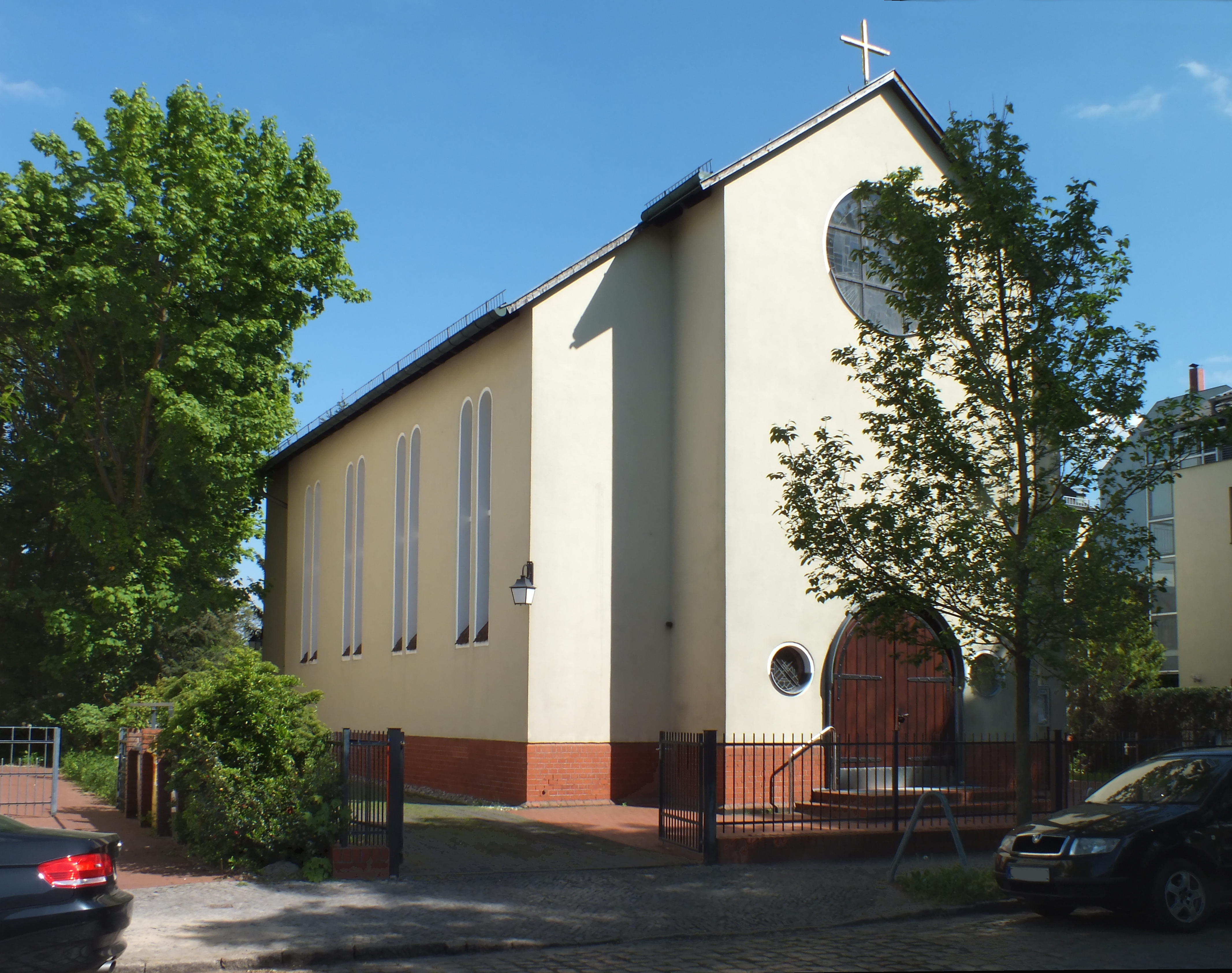 Berlin-Friedrichshagen: katholische Kapelle St. Franziskus, Ansicht von Nordwest